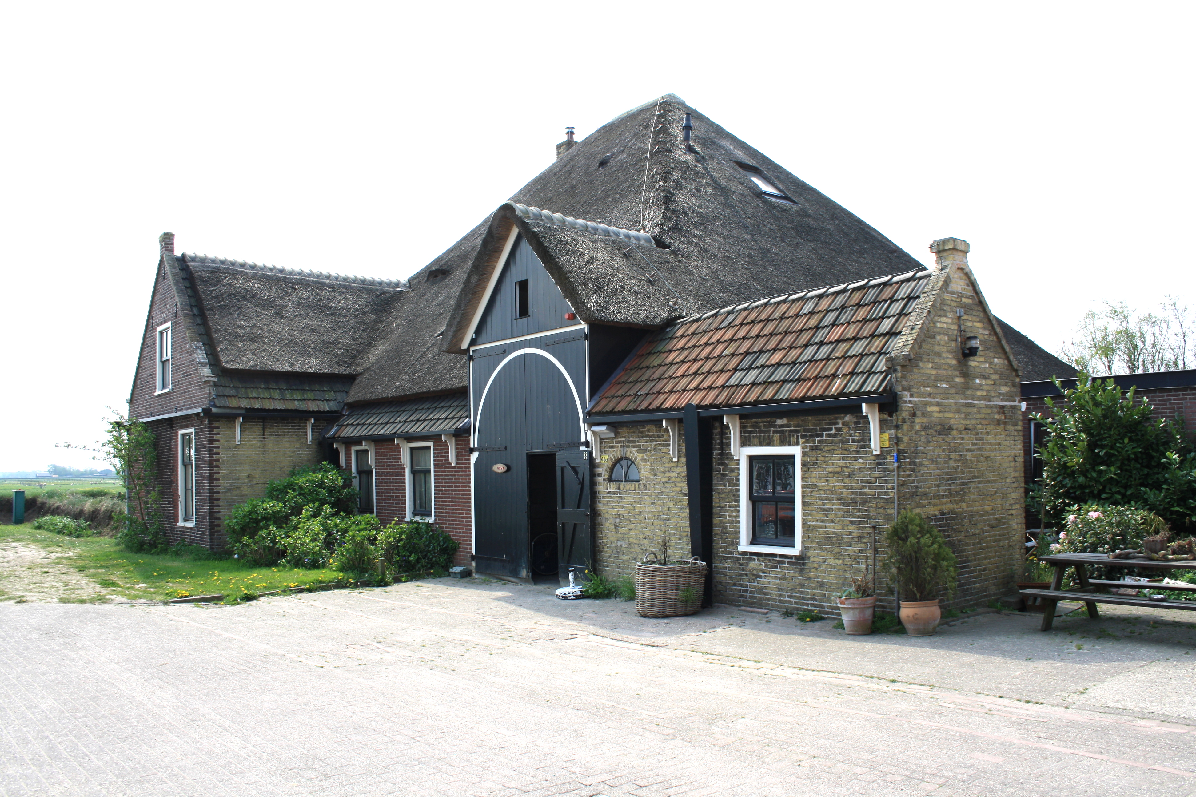 Boerderij Texel-Den Hoorn-Hoornderweg 46 Plaatselijk bekend Novalishoeve ex St.Donatus - gebouwd in 1892 nadat de vorige boerderij afbrandde na blikseminslag